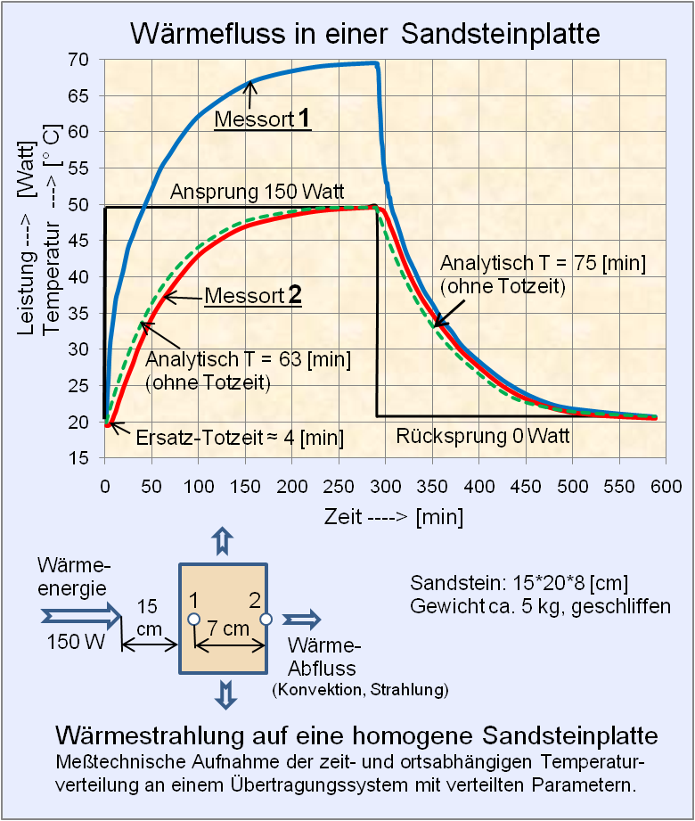 Wärmefluss als Sprungantwort an einer Sandsteinplatte